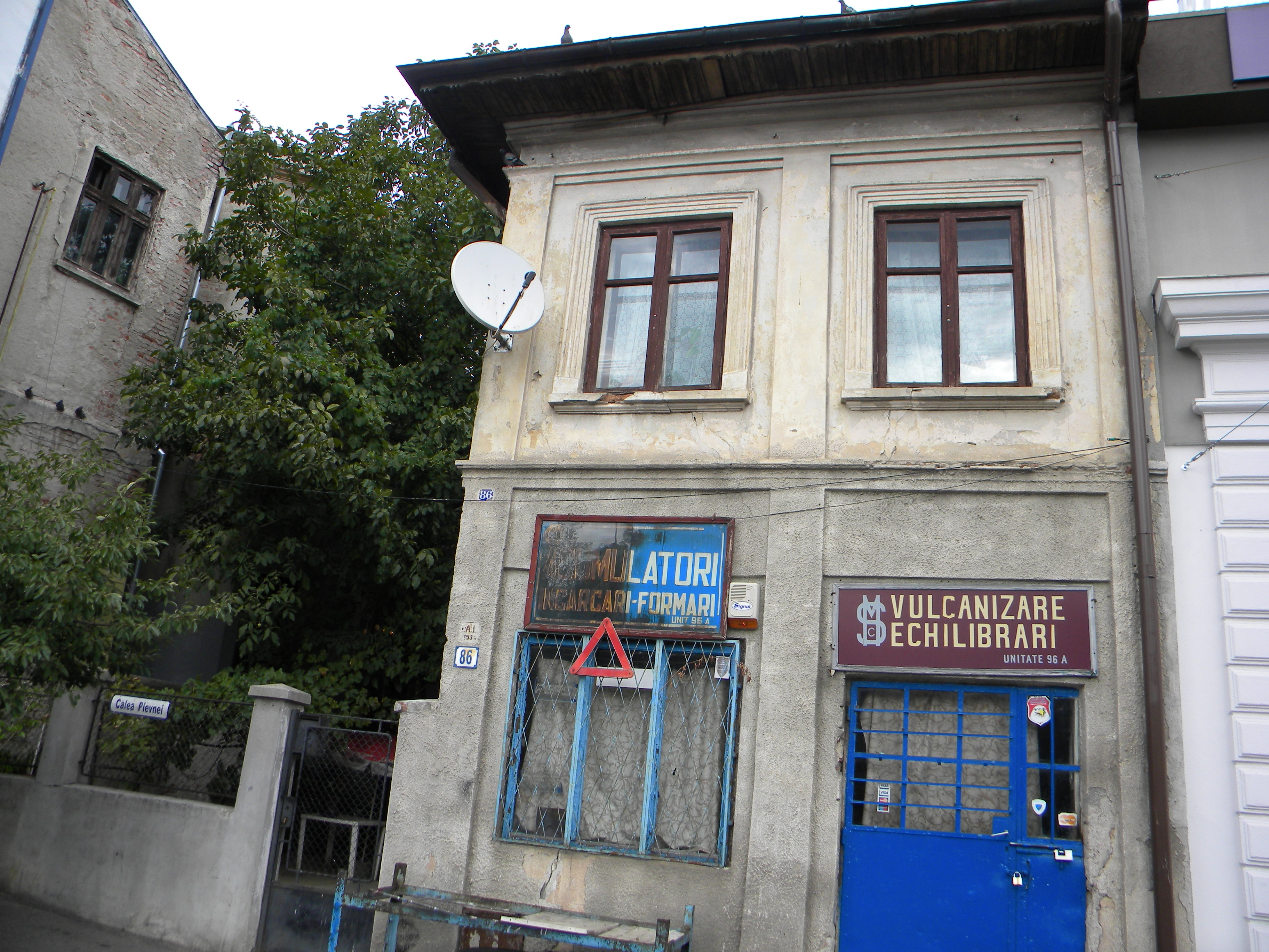 Bucuresti, Romania, Casa pe Calea Plevnei nr. 86, sect. 1